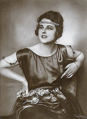 Marcella Albani